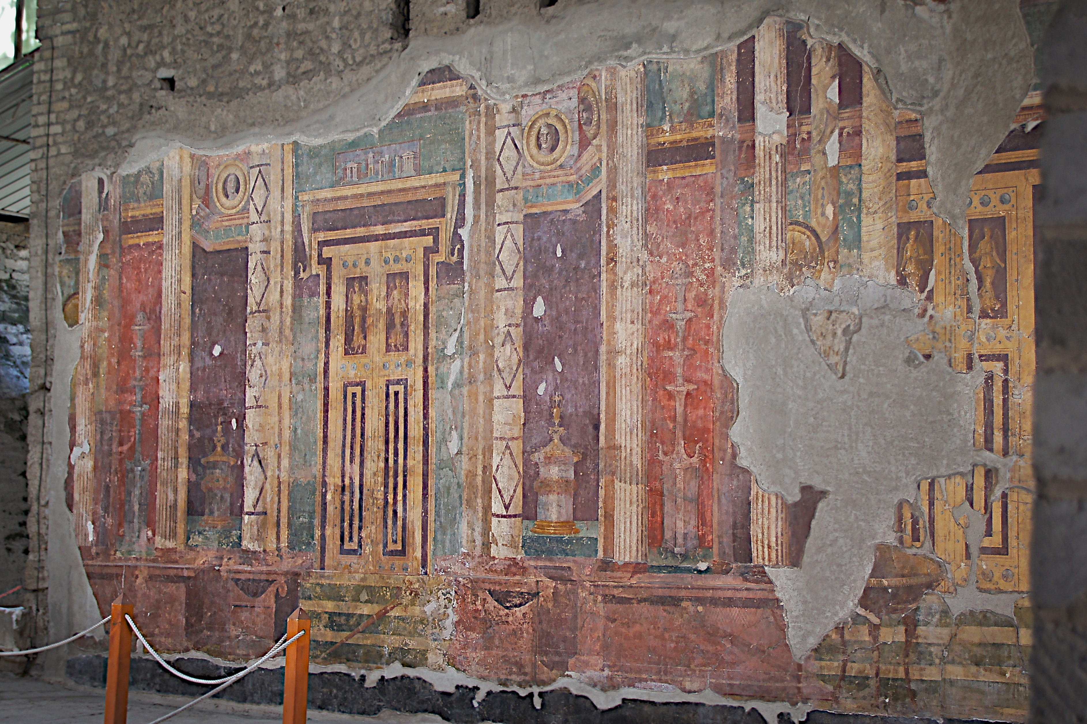 Wandmalereien, Villa der Poppaea